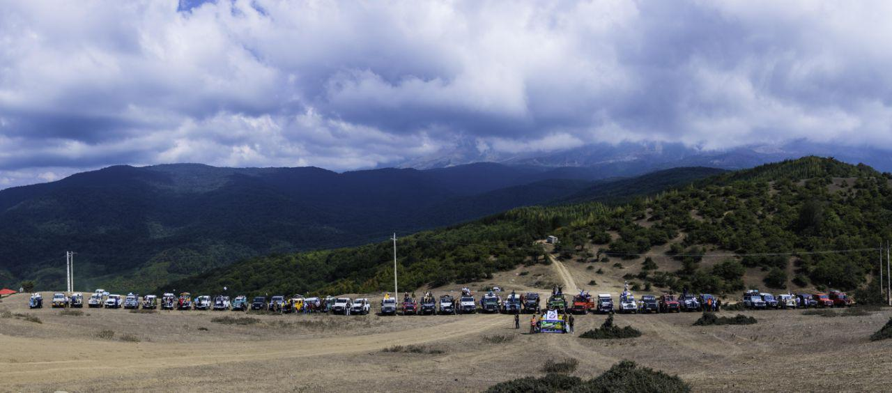 دوازدهمین گردهمایی کلوپ لندرور ایران با حضور بیش از 60 لندرور